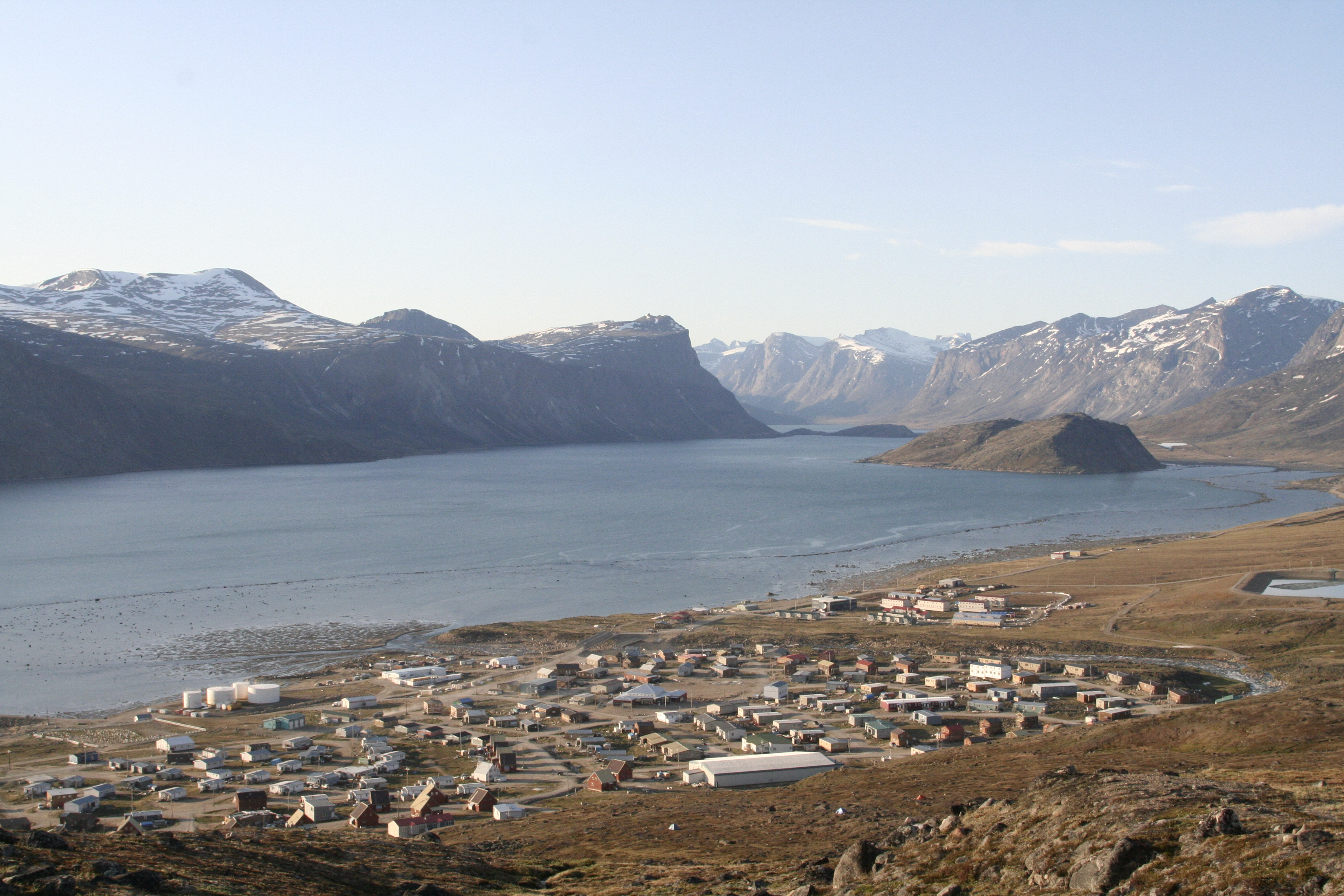 Looking down on Pangnirtung, Nunavut.